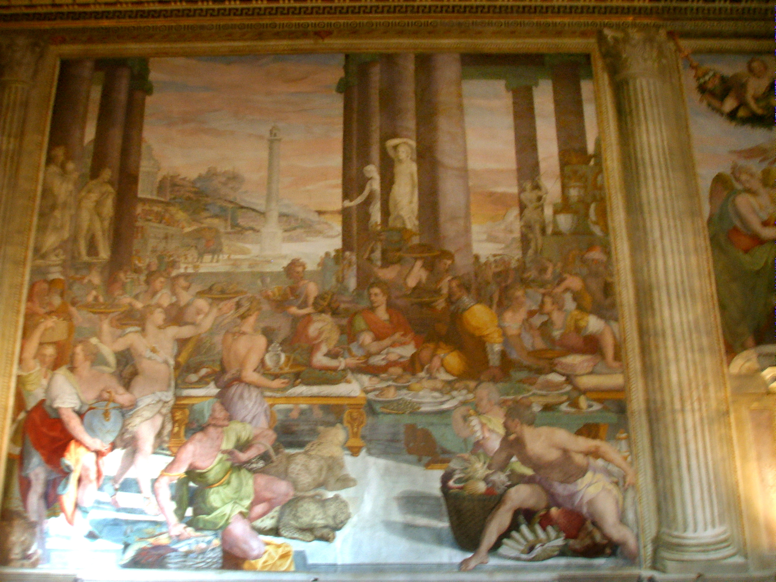 Villa medicea di Poggio a Caiano, inside sala di Leone X Fresco by Alessandro Allori and Andrea del Sarto in Poggio a Caiano, Italy